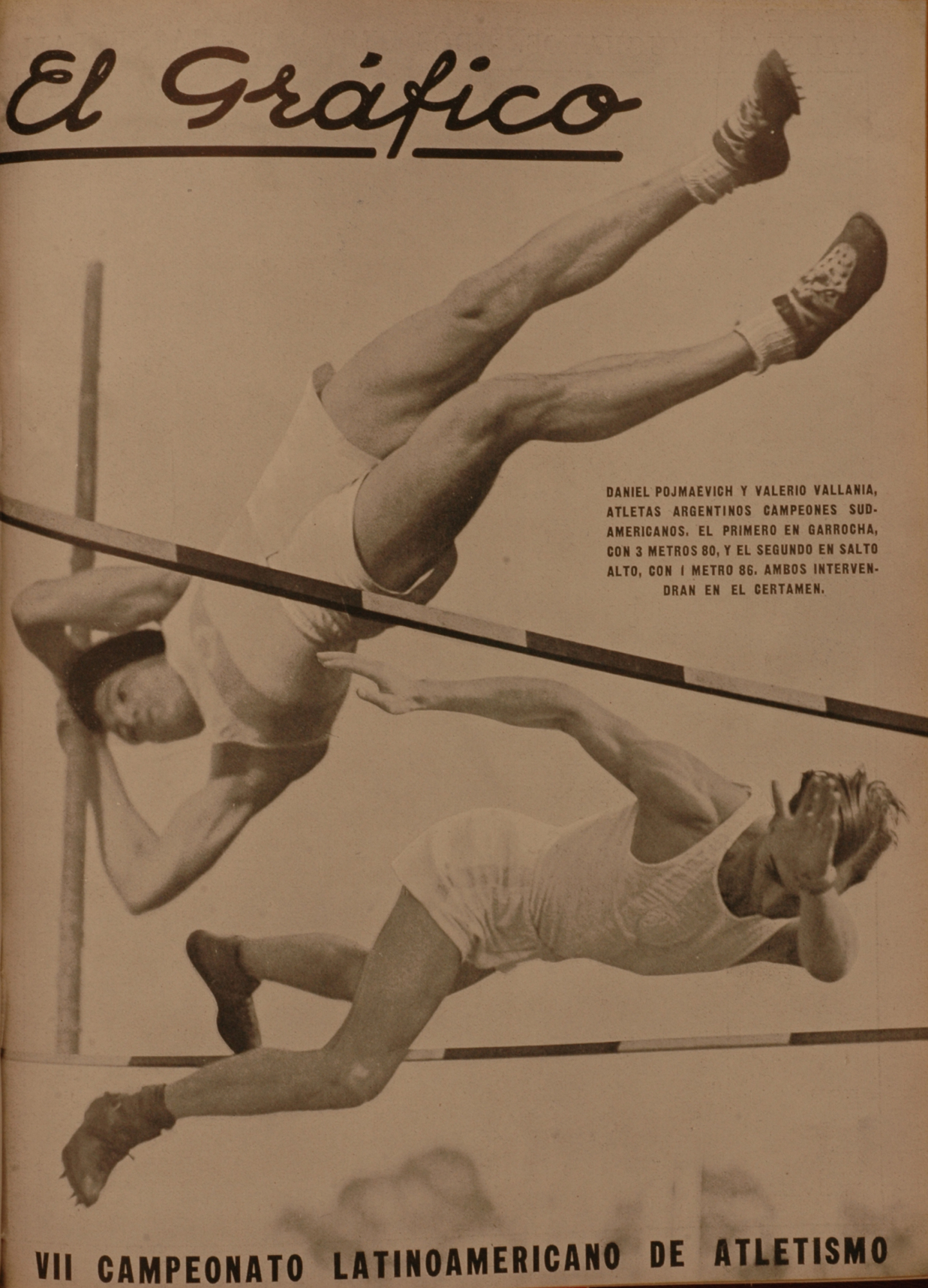 El Grafico del 25 de Abril de 1931. Edicion 615